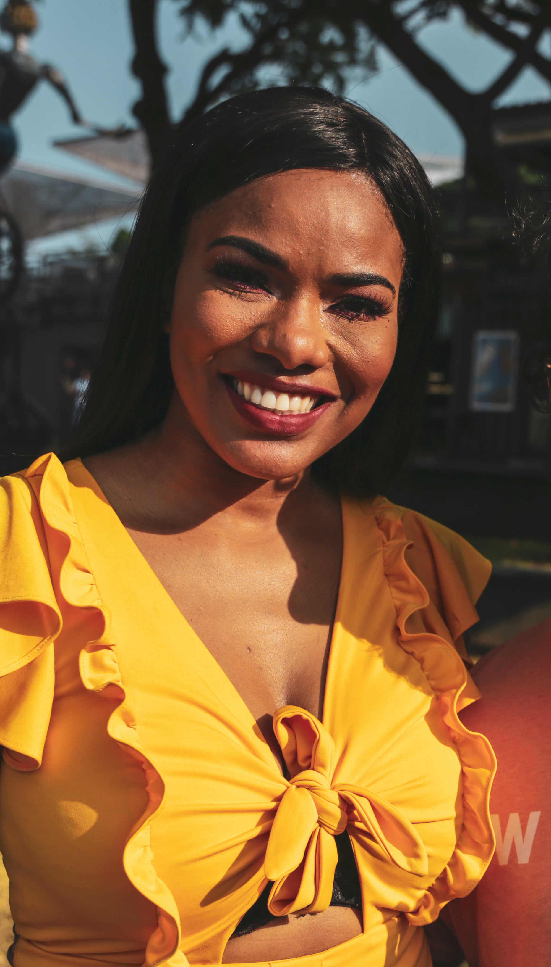 Denisse Angulo en 2019.